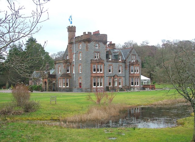 Isle of Eriska Hotel